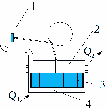 Stirlingov motor - schéma